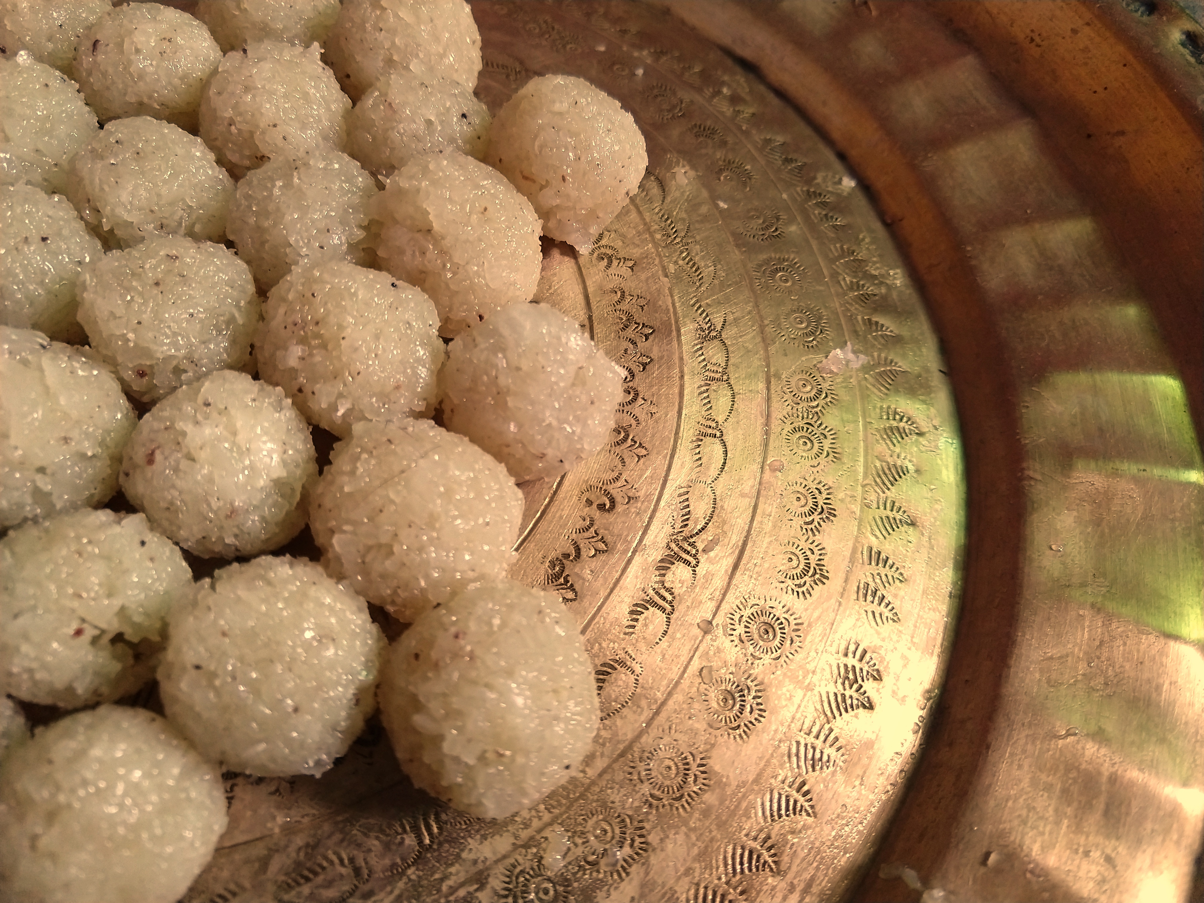 নারকেলের নাড়ু। বাঙালির নিজস্ব মিষ্টান্ন